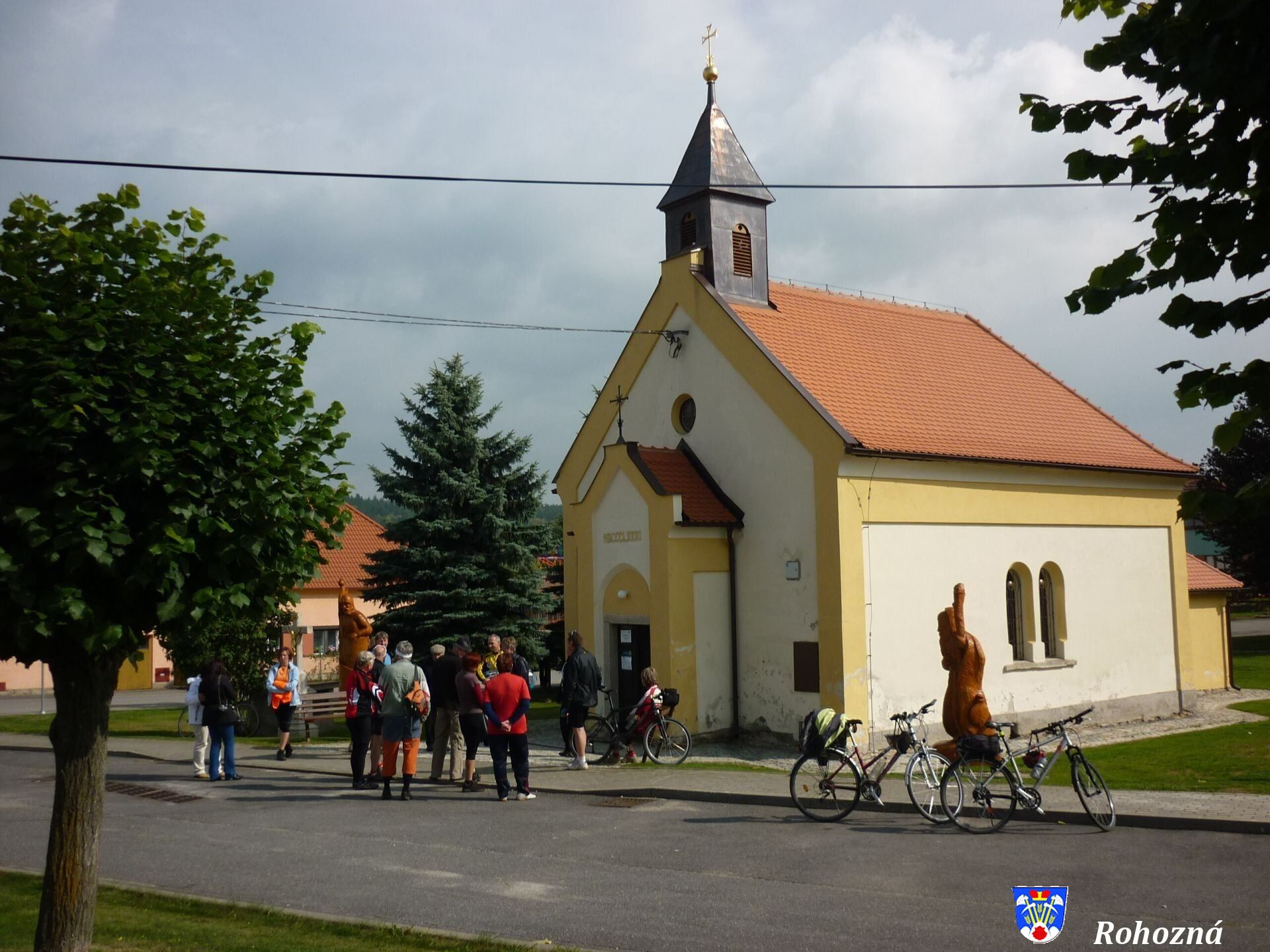 Obec Rohozná - cyklovýlet "Po stopách regionu Renesance"